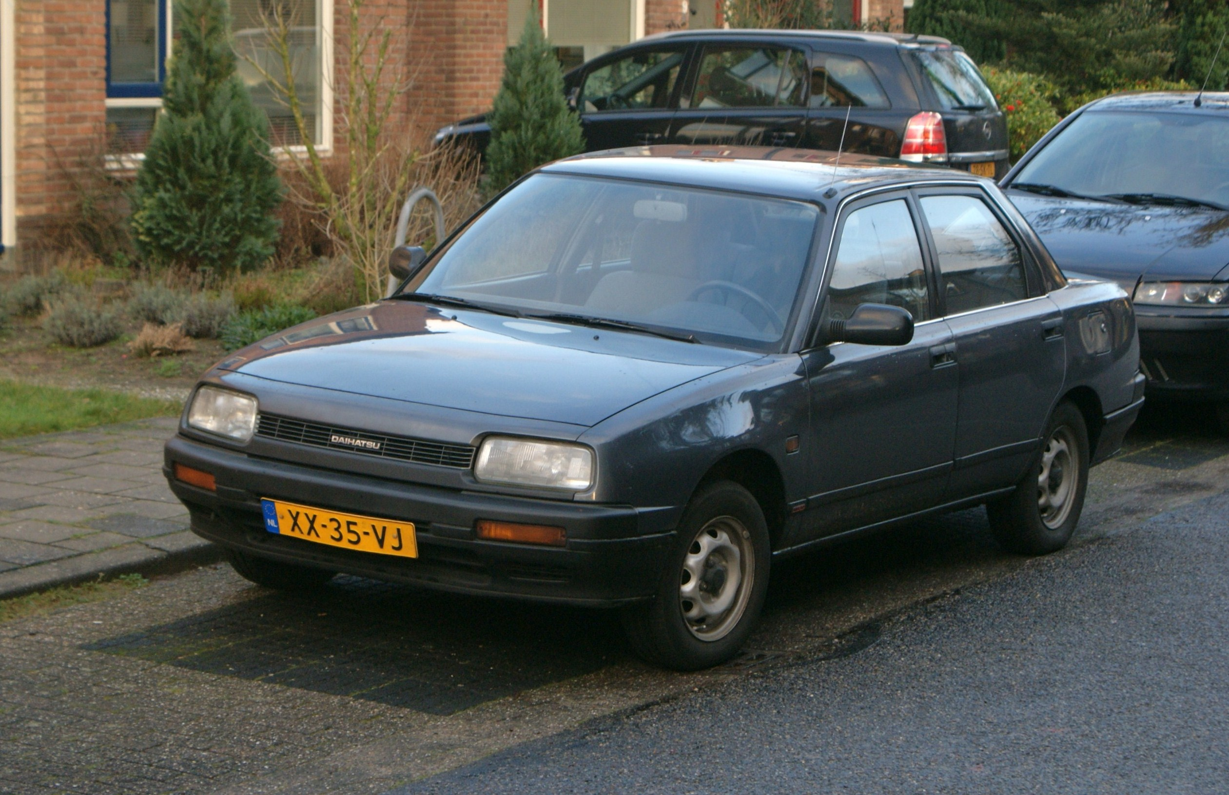 XX-35-VJ